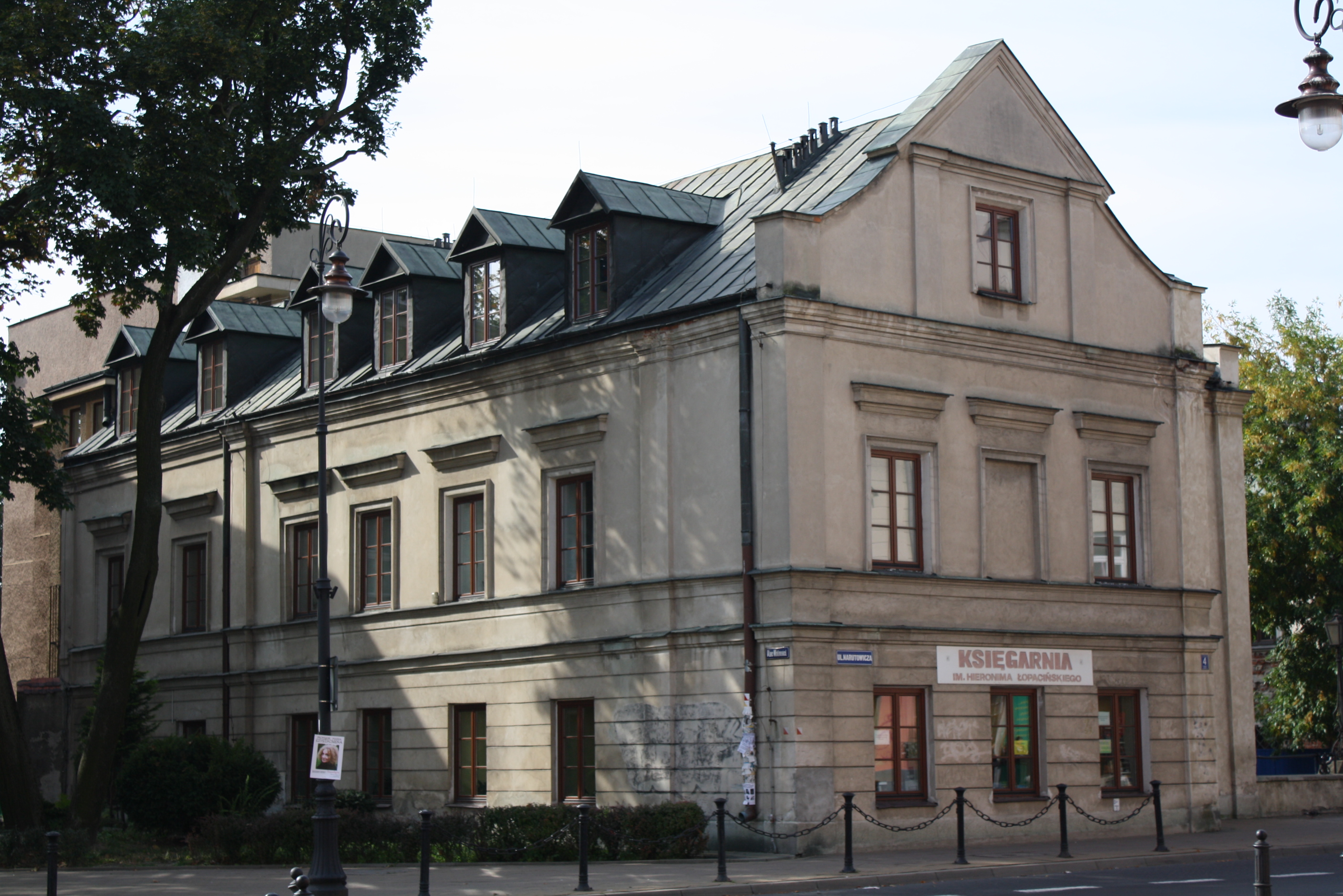 Lublin - zespół biblioteki im. Łopacińskiego: na ul.Narutowicza 4 - oficyna popijarska I, ob. biblioteka